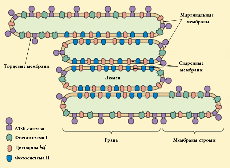 Протеомный состав мембраны тилакоида и расположение в ней фотосинтезирующих комплексов.